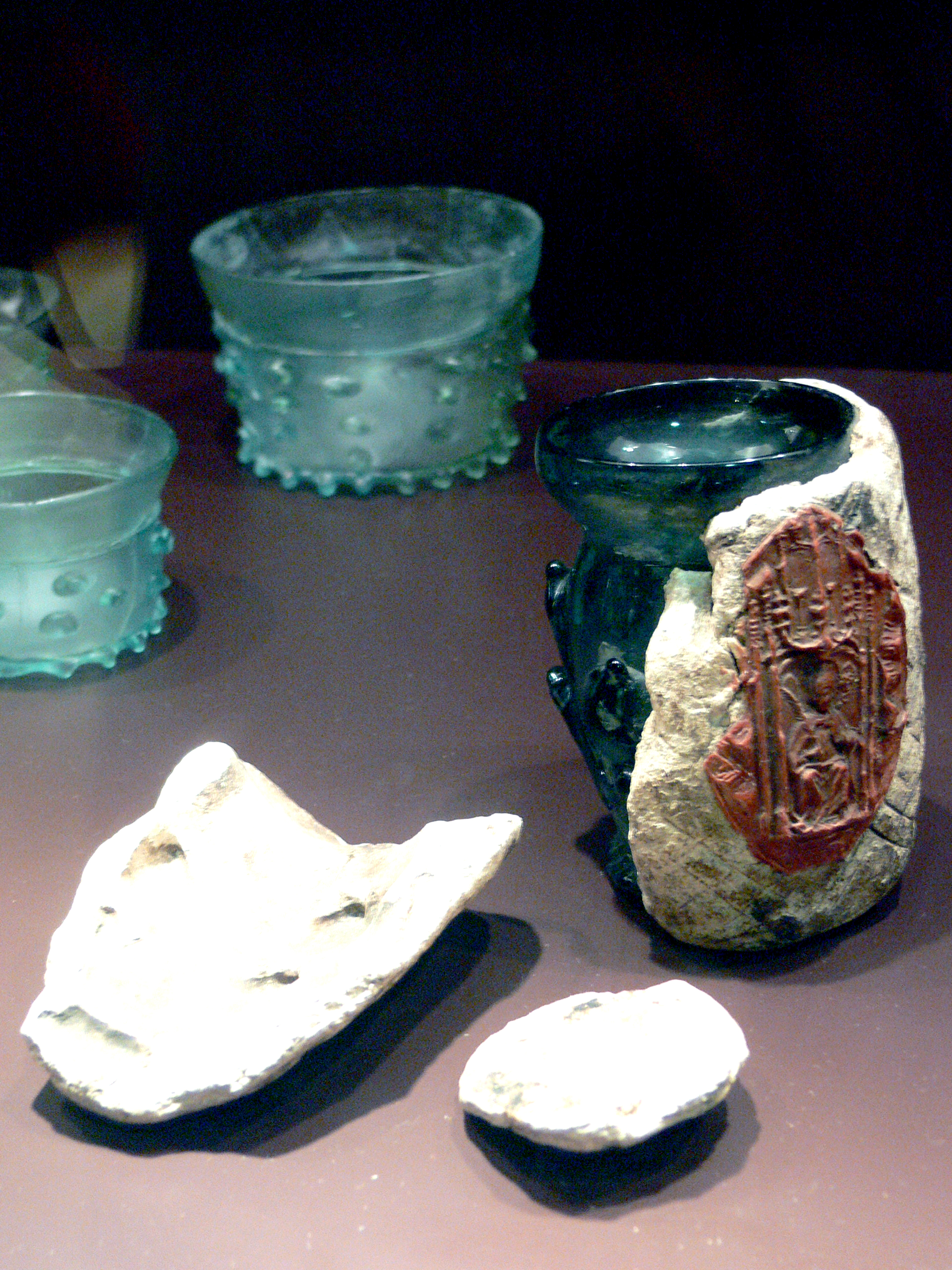 « Krautstrunk », Tyrol, vers 1500, Museum Kunst Palast, Dusseldorf